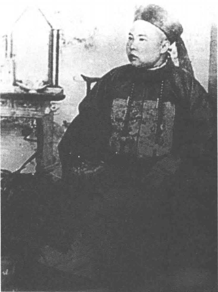 中文（中国大陆）: 芒市第21世土司放正德